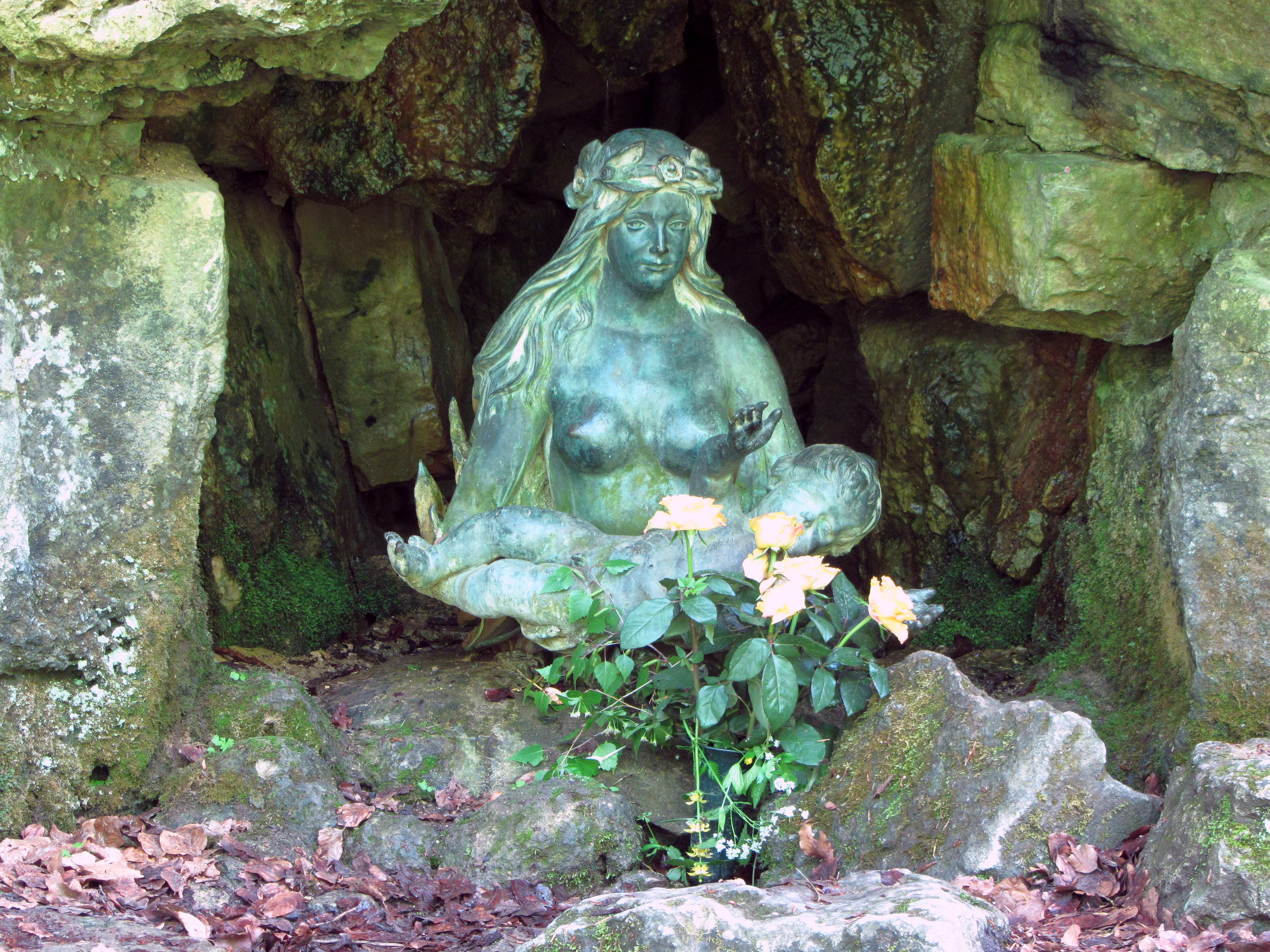 Kleiner Reinsbrunnen in Göttingen, oberhalb der Schillerwiese. Bronzeplastik Nixe und Kind, Friedrich Küsthardt, 1901